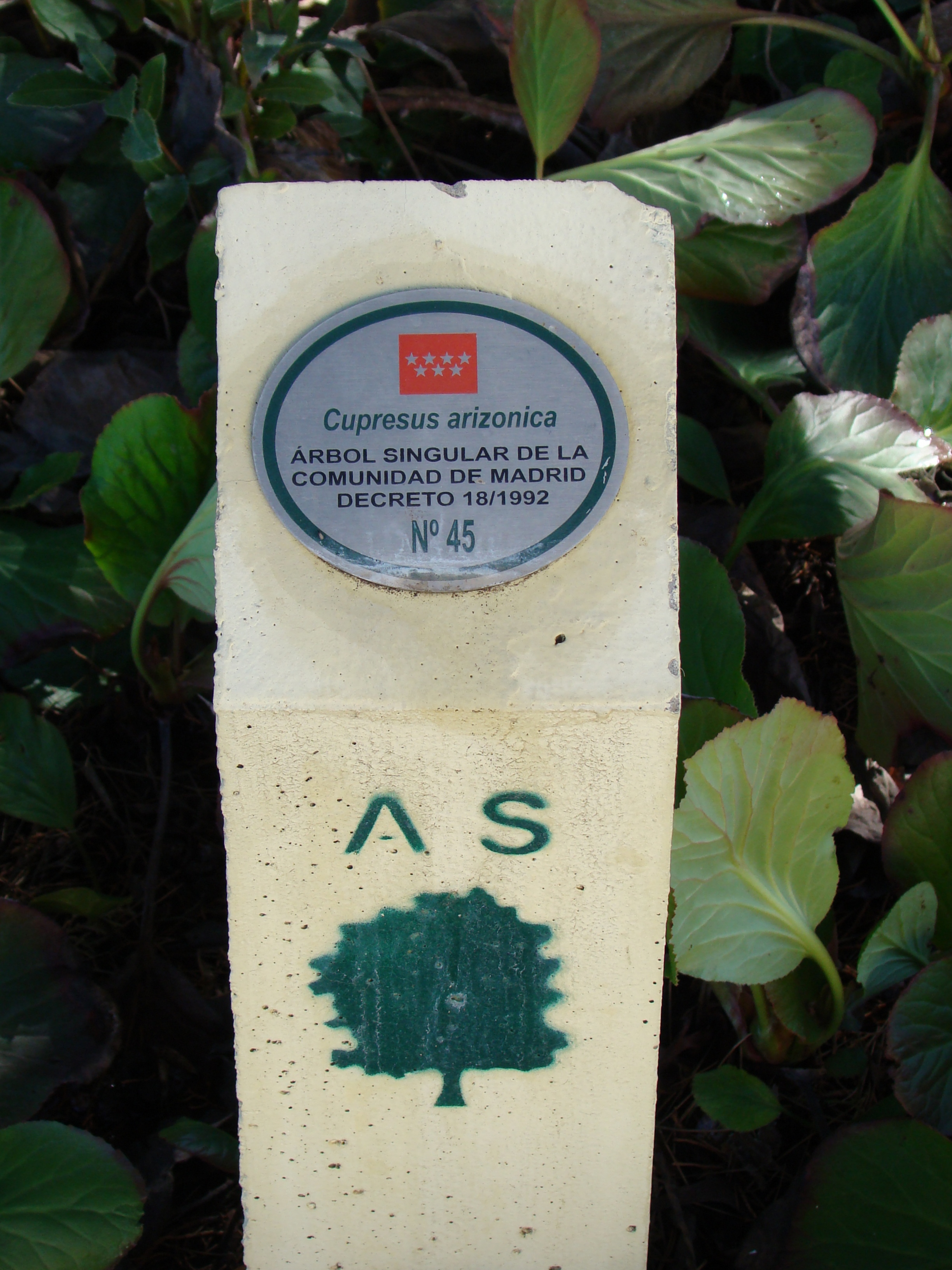 Castillo de Viñuelas, Madrid, España.